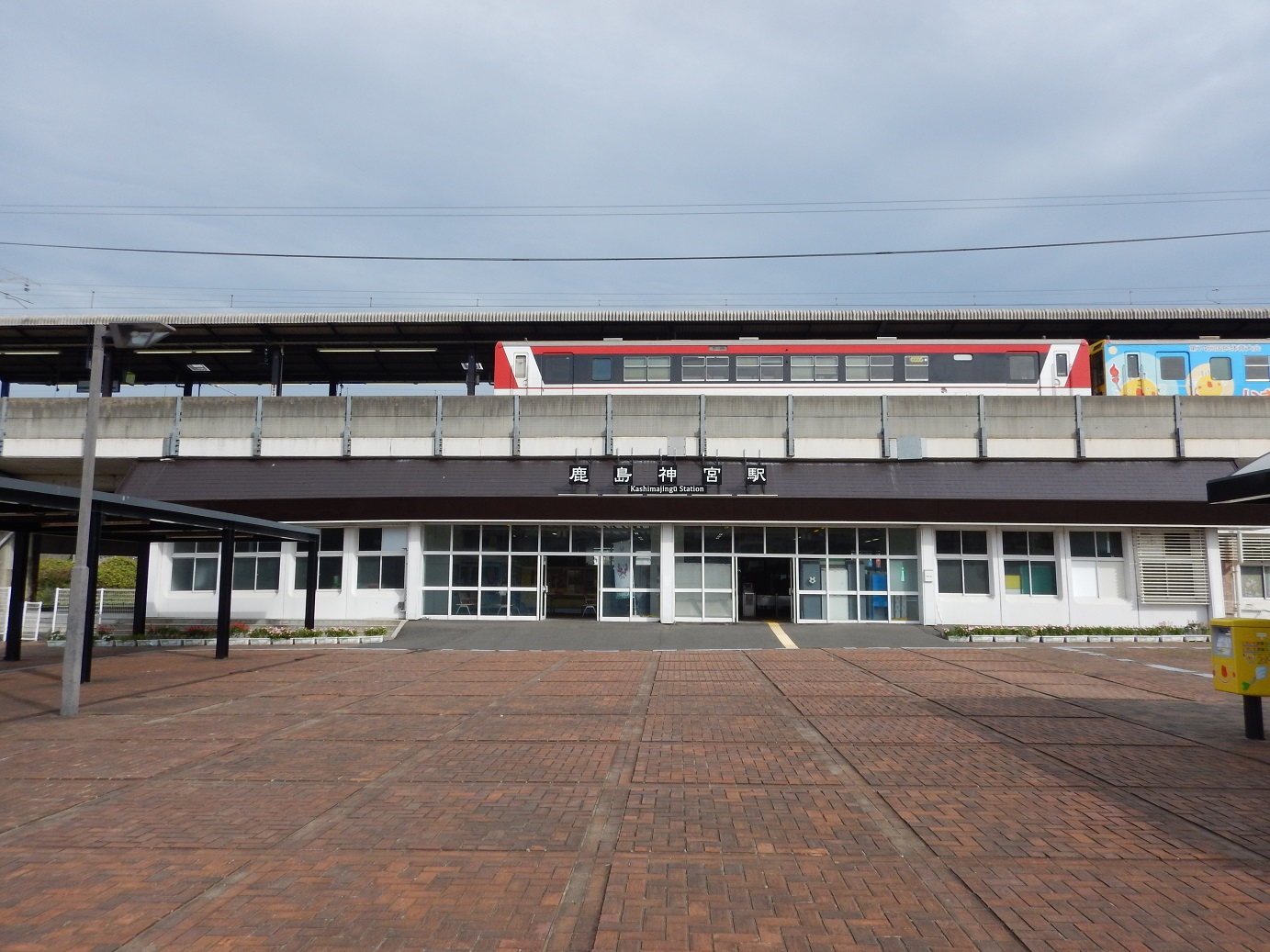 鹿島神宮駅（2019年9月）